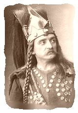 VAGUET, Albert : ténor dans "Les Barbares" Contents 1 Auteur 2 Source 3 Licensing 4 Original upload log Auteur D'une photo des ateliers Nadar, prise le 28/10/1901 (F. Nadar étant décédé en 1910, cette photo est maintenant tombée dans le domaine public). Source Archives Photographiques (Médiathèque de l'Architecture et du Patrimoine) © CNM (En cas de reproduction, même partielle, mentionner : base de données Mémoire, ministère de la Culture et de la Communication - direction de l'Architecture et du Patrimoine).